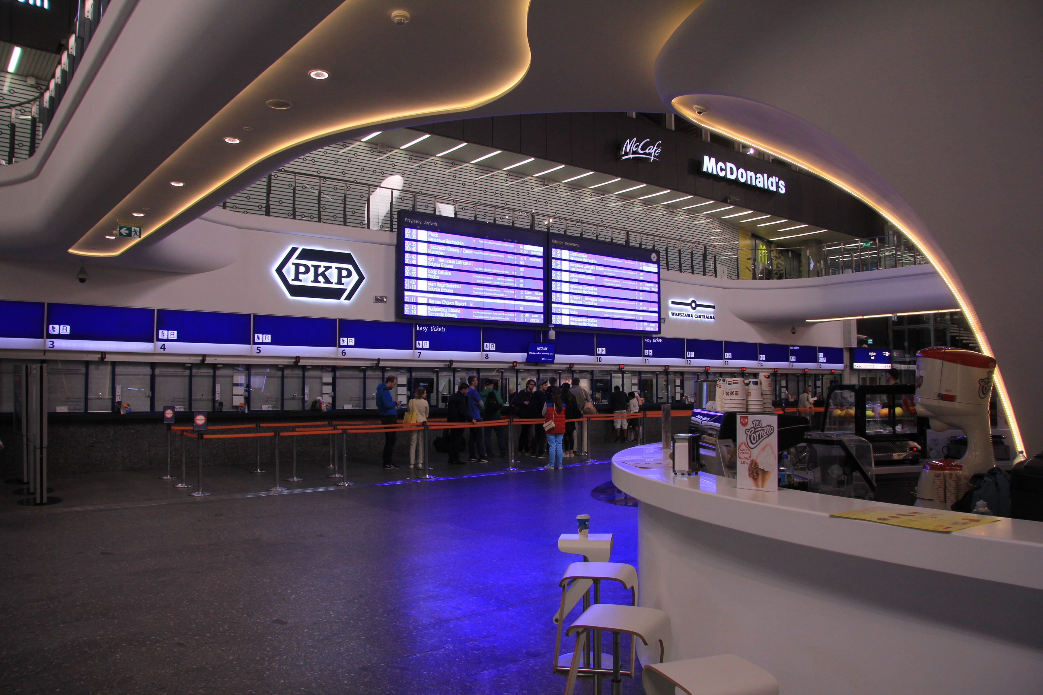 Warszawa Centralna - wnętrze